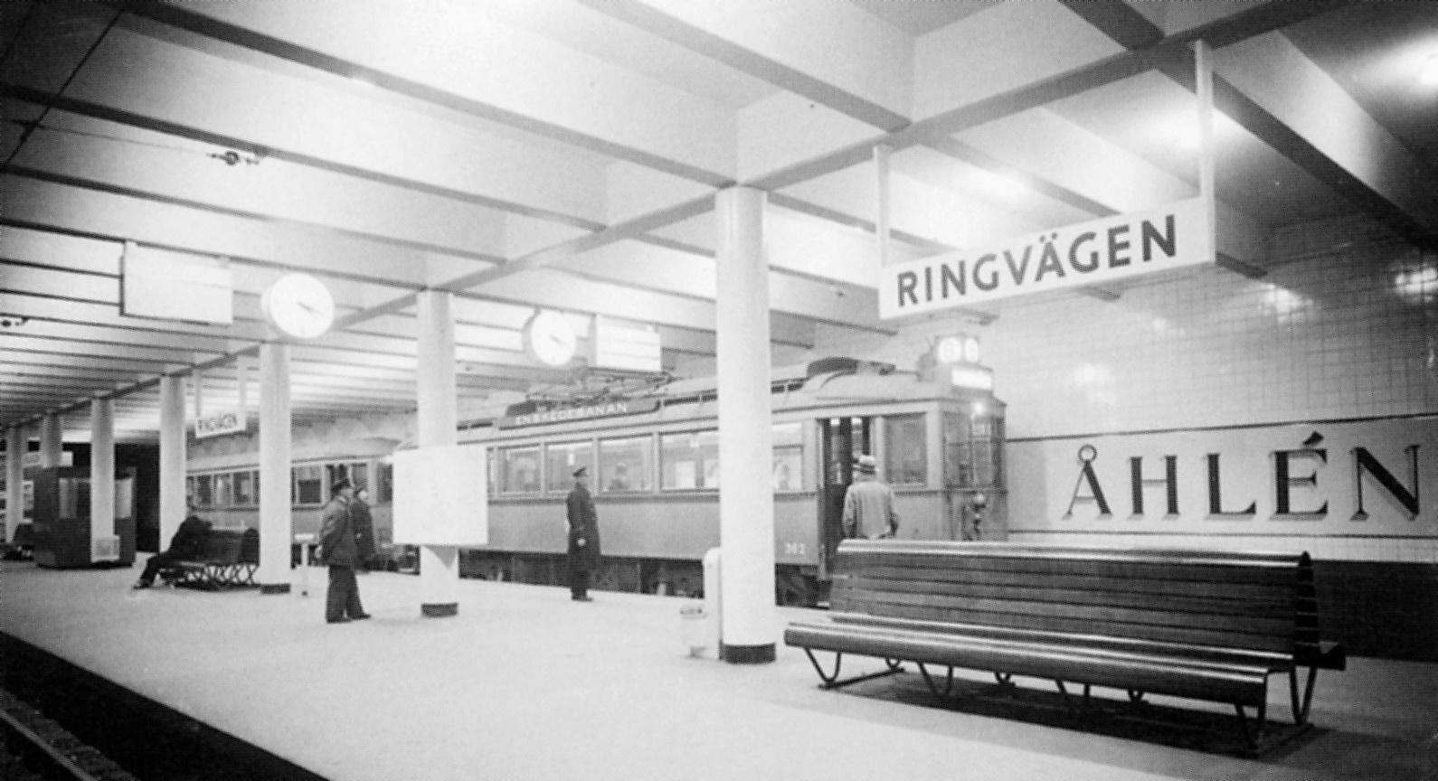 Station "Ringvägen" (numera "Skanstull"), tunnelbana i Stockholm, 1930-tal